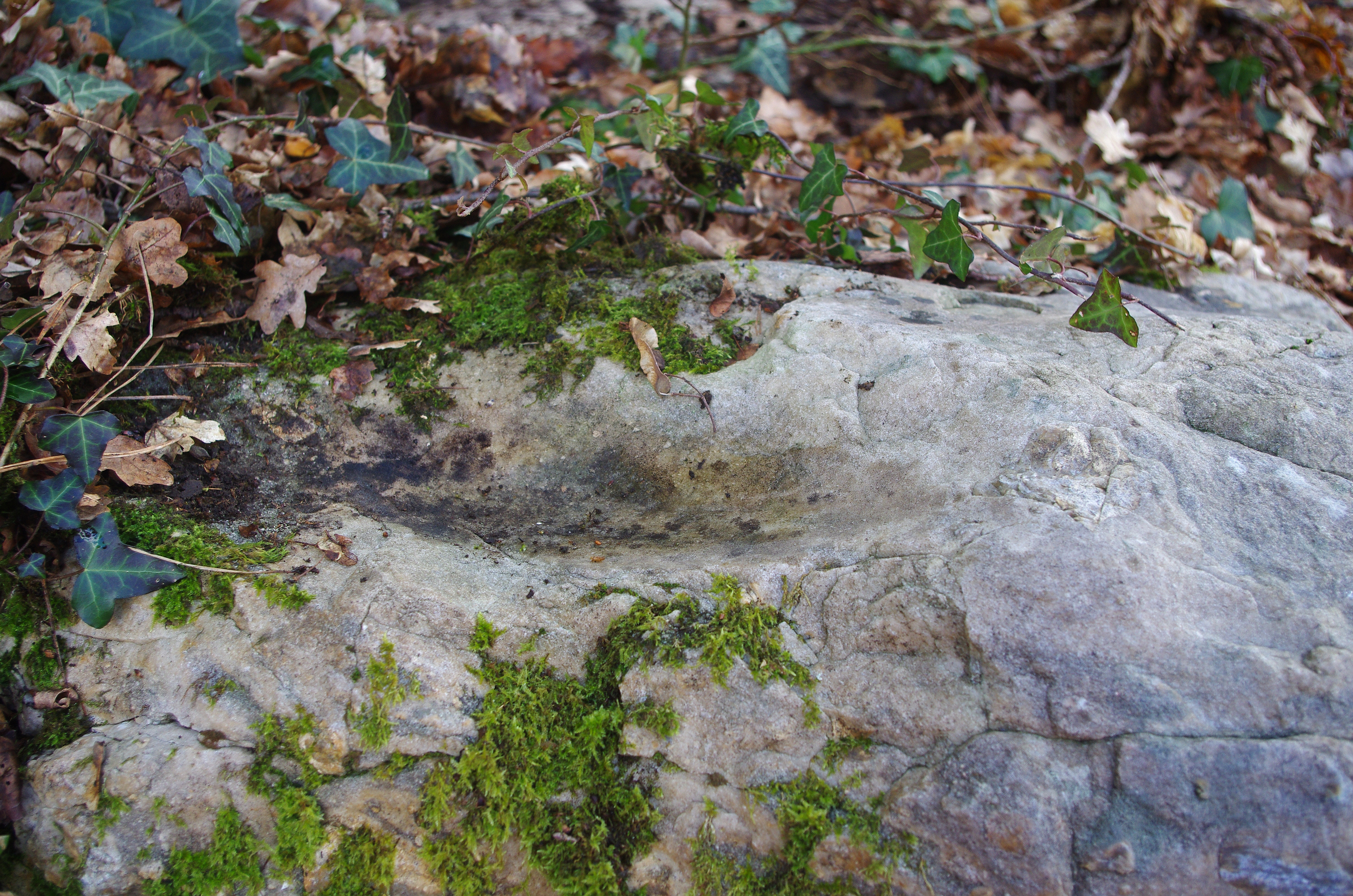 Monthou-sur-Cher (Loir-et-Cher) Cuvette de polissage. Polissoirs datant du néolithique (5 000 av J. C. 2500 av J. C.). Ils sont situés au bord du ruisseau des Anguilleuses, au lieu-dit "La Crémaillère". Polishers Neolithic (5000 BC 2500 BC). They are located at the edge of the Anguilleuses stream, at a place called "The Crémaillère". Le ruisseau des Anguilleuses doit son nom au grand nombre d'anguilles qui s'y trouvait au siècle dernier. Ce cours d'eau vient de Pontlevoy où il est appelé Trainefeuilles. Les polissoirs sont des blocs de roches dures et abrasives, souvent du grès. Les polissoirs portent des cuvettes ovales parfois rondes à fond très uni et des rainures anguleuses en forme d’U ou de V évasés , plus ou moins longues. Les uns n’ont que des rainures, d’autres que des cuvettes, les plus nombreux ont à la fois des cuvettes et des rainures. On remarque sur quelque-uns, des surfaces planes polies. Les rainures sont souvent parallèles entre elles, d’autres fois, elles sont réparties très irrégulièrement sur la surface de la roche, quelquefois elles se coupent … » Les cuvettes, comme c'est le cas ici, étaient destinées au polissage des faces et du tranchant. MONTHOU-sur-Cher (canton de Montrichard). — Deux Pol. près de la Crémaillère, l'un avec 6 C. l'autre avec 3 C, encore en place. — S.V. 1917,p. 50; Fréon, Amis du Vieux Montrichard, 1957. MONTHOU-sur-Cher (canton de Montrichard). — Don au Musée de Blois d'une moitié de pol. en grès (égaré). — B.H.N., n° 21, 1929, p. 118.